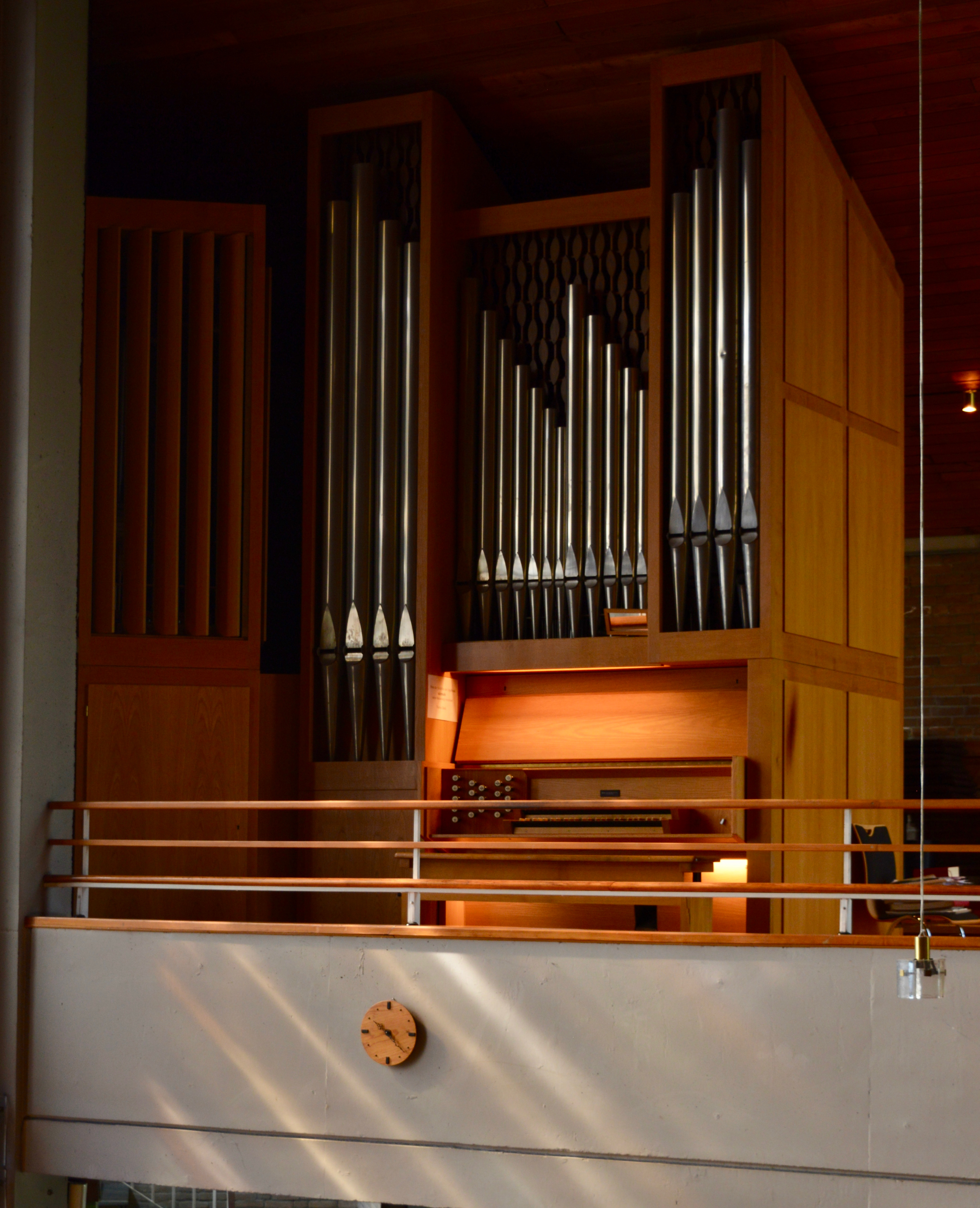 Orgel in der Kirche St. Michael in Detmold Hiddesen. Hersteller war ursprünglich die Firma Beckerath aus Hamburg